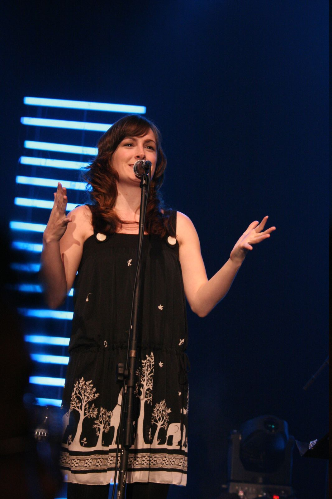 Sara Gazarek at the 2008 Java Jazz Festival